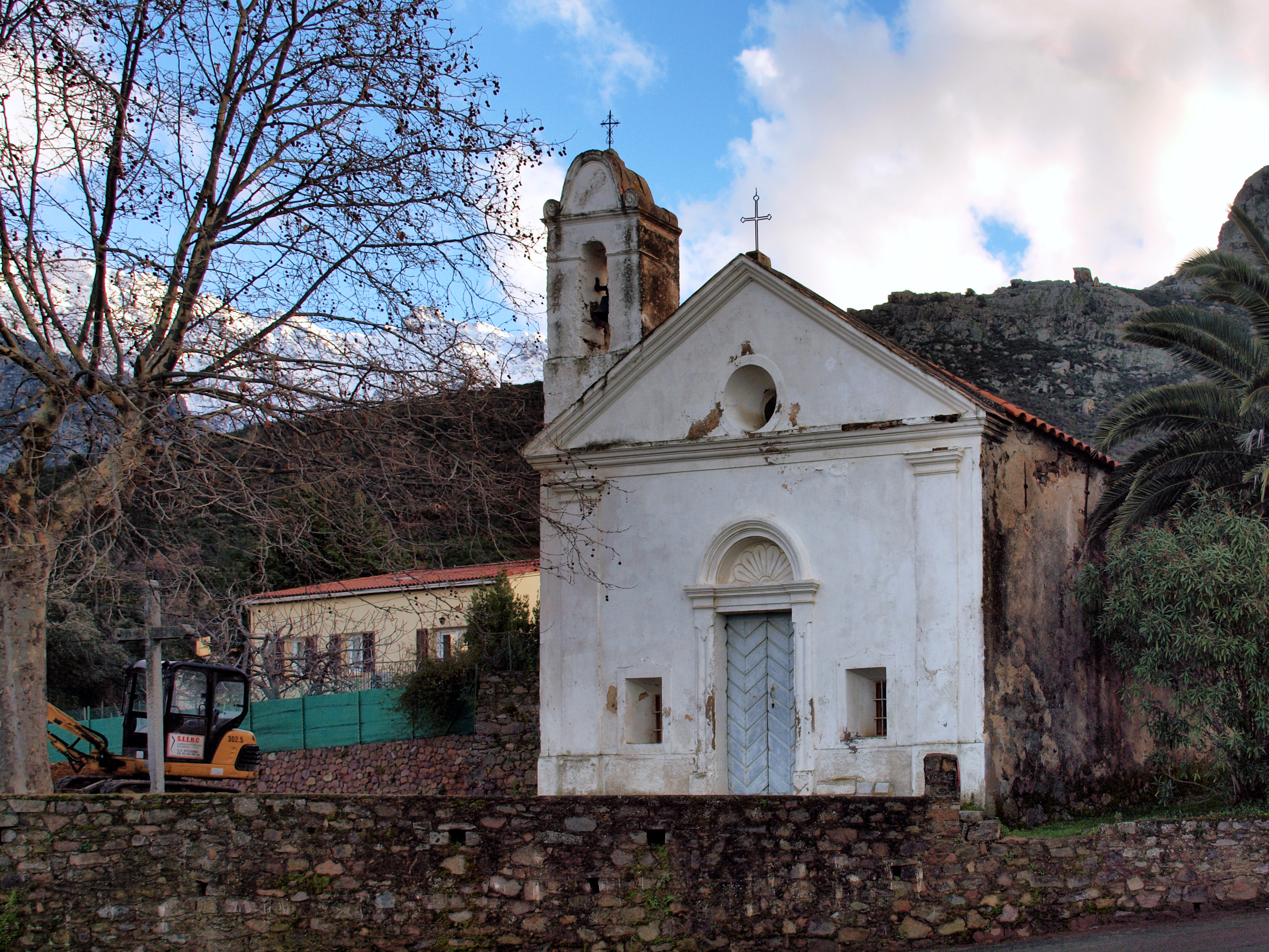 Calenzana, Balagne (Haute-Corse) - Chapelle Saint-Ignace sur la route de Zilia.